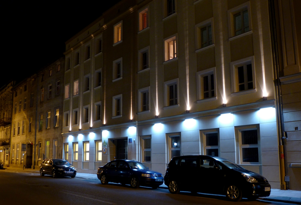 Hostel